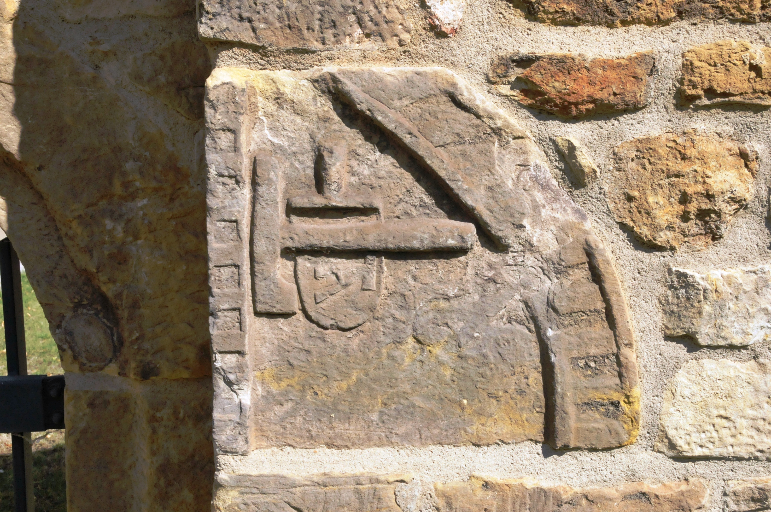 Wandersleben, alter rekonstruierter Tordurchgang zur Kirche, Detail im Mauerwerk